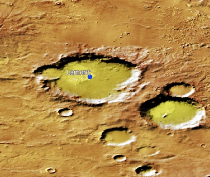 Cráter marciano Lamont.(Imagen IAU/USGS/Goddard/A SU/USGS)